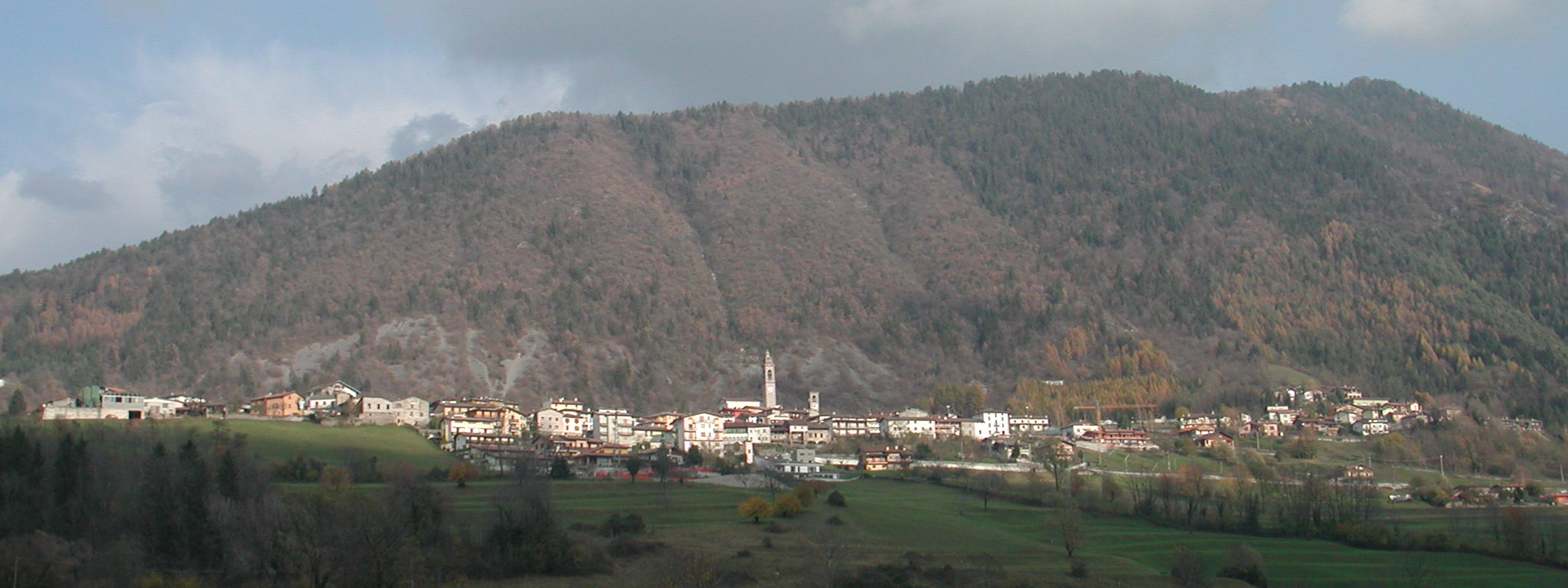 Cerete alto